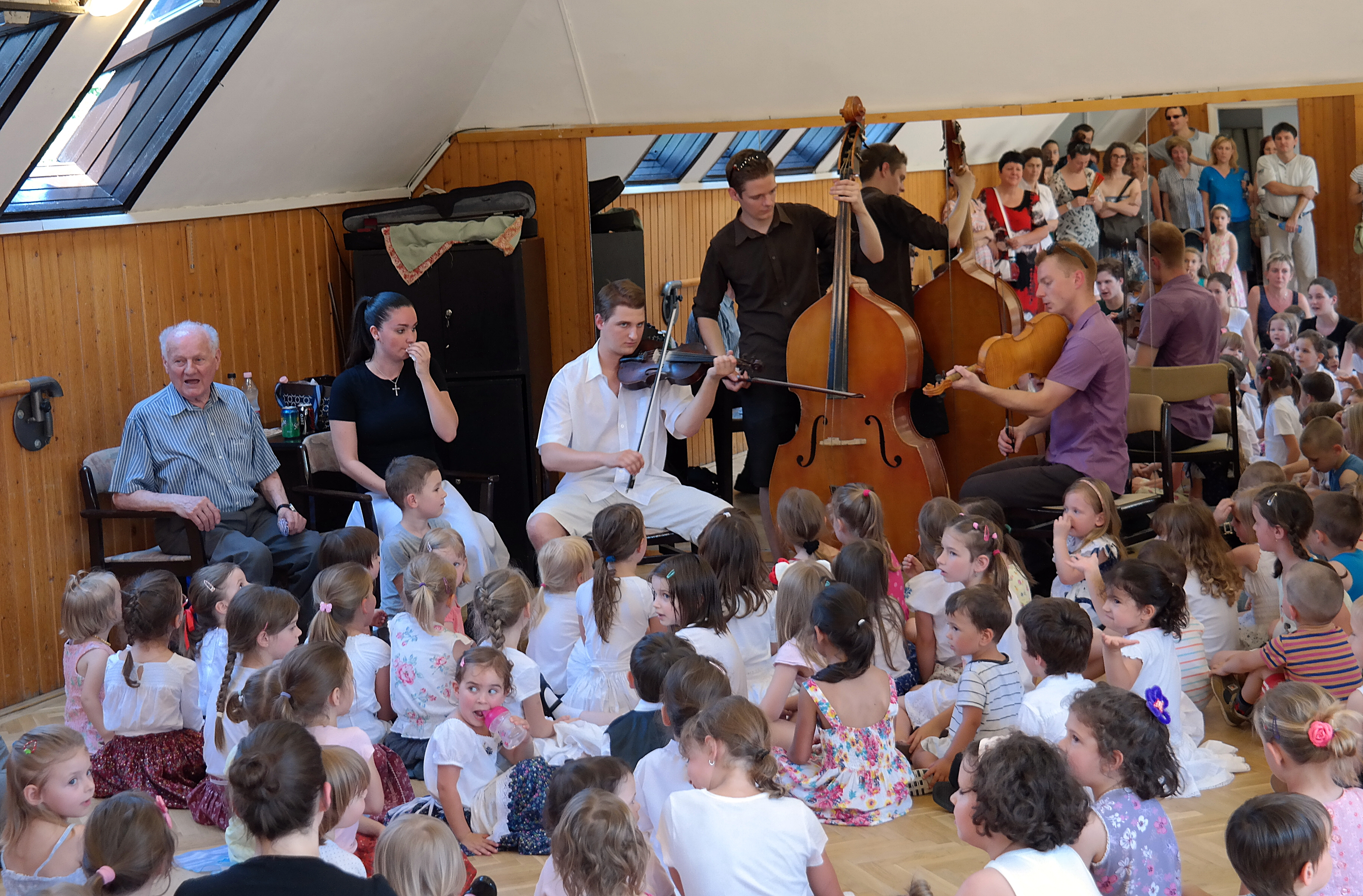 Timár Sándor a „csillagszeműek“ próbáján. Virányosi Közösségi Ház.